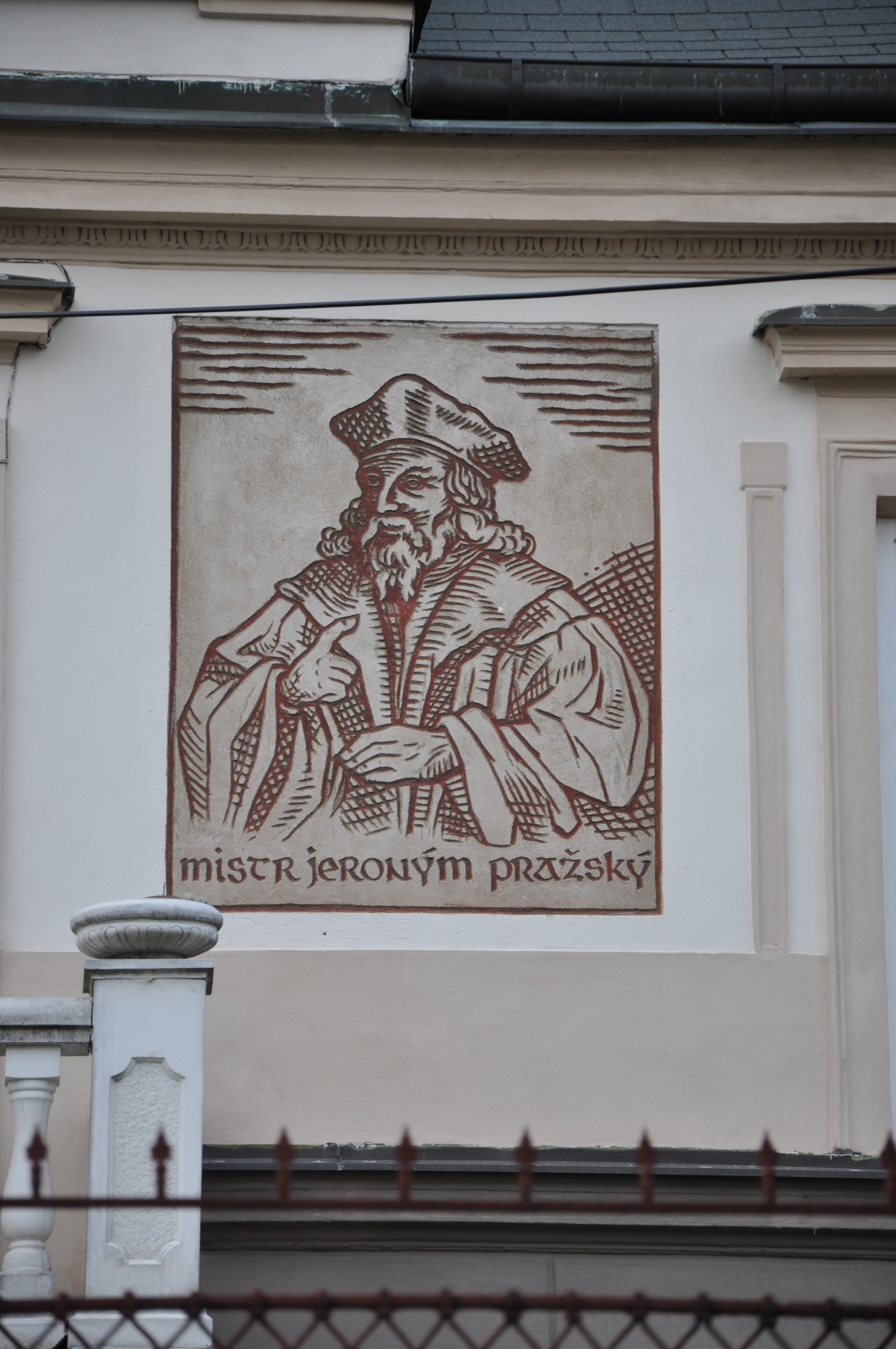 Farního úřadu Církve Československé Husitské. Ulice B. Kobzinové č. p. 2088. Spodní část budovy s balkónem, zahrádkou a plotem naproti vchodu do Husova sboru. Mezi ulicí Dobrovského zleva a ulice B. Kobzinové zprava. Část venkovní omítky Farního úřadu je ozdobena sgrafity. Sgrafit - Mistr Jeroným Pražský. Město Havlíčkův Brod. Kraj Vysočina. Czech Republik